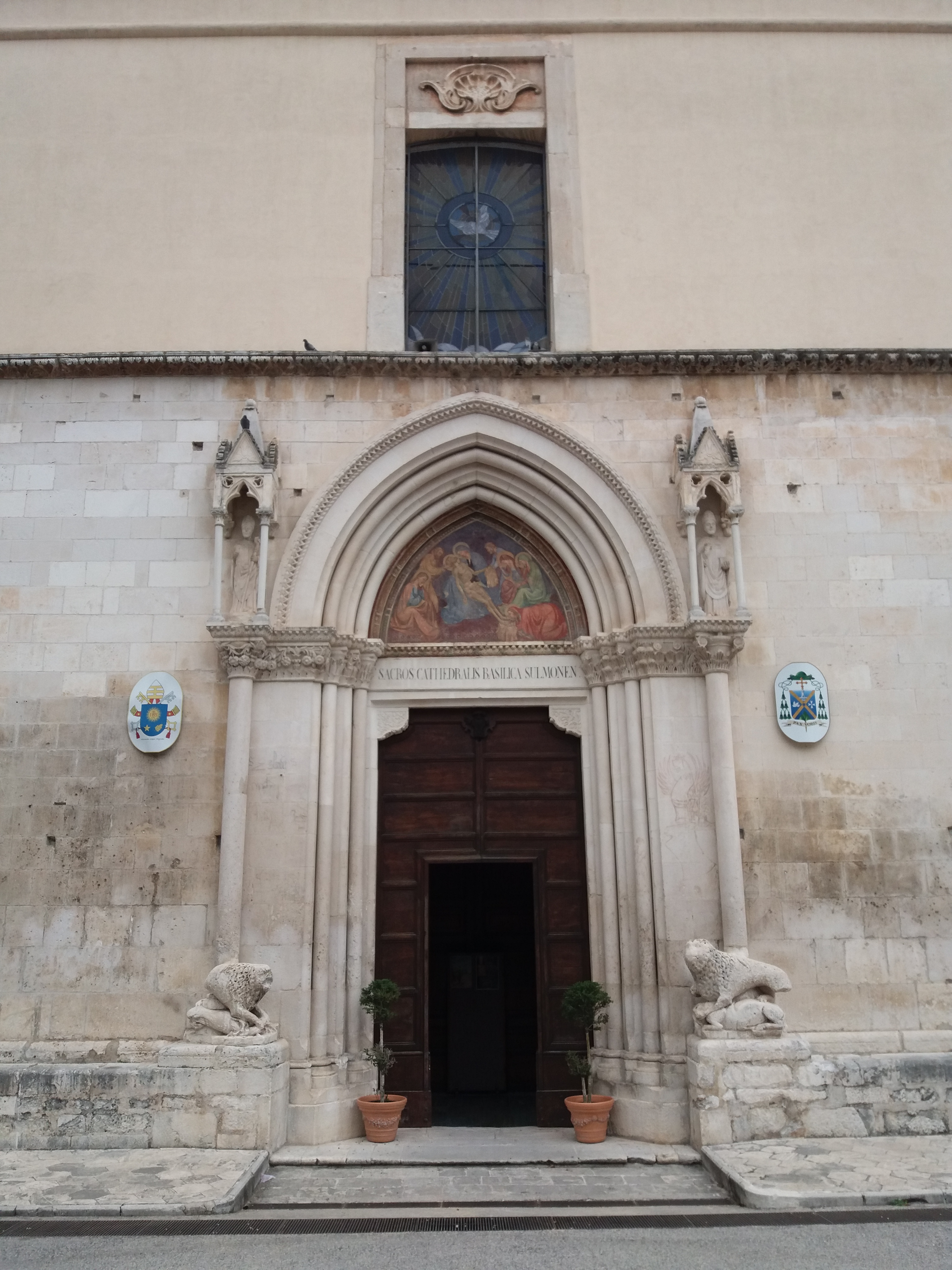 Sulmona: Cattedrale di San Panfilo